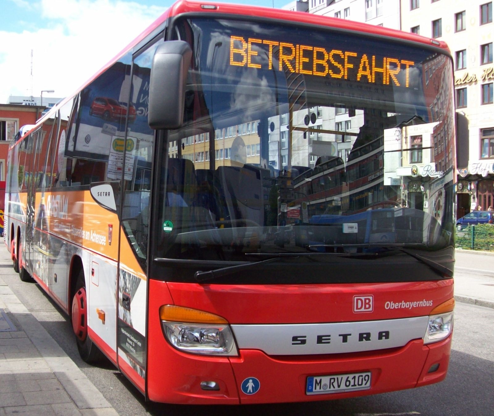 Der Wagen 6109 der Regionalverkehr Oberbayern GmbH (RVO) / DB Oberbayernbus, ein Setra S 419 UL am 31. Juli 2013 am Münchener Hauptbahnhof.